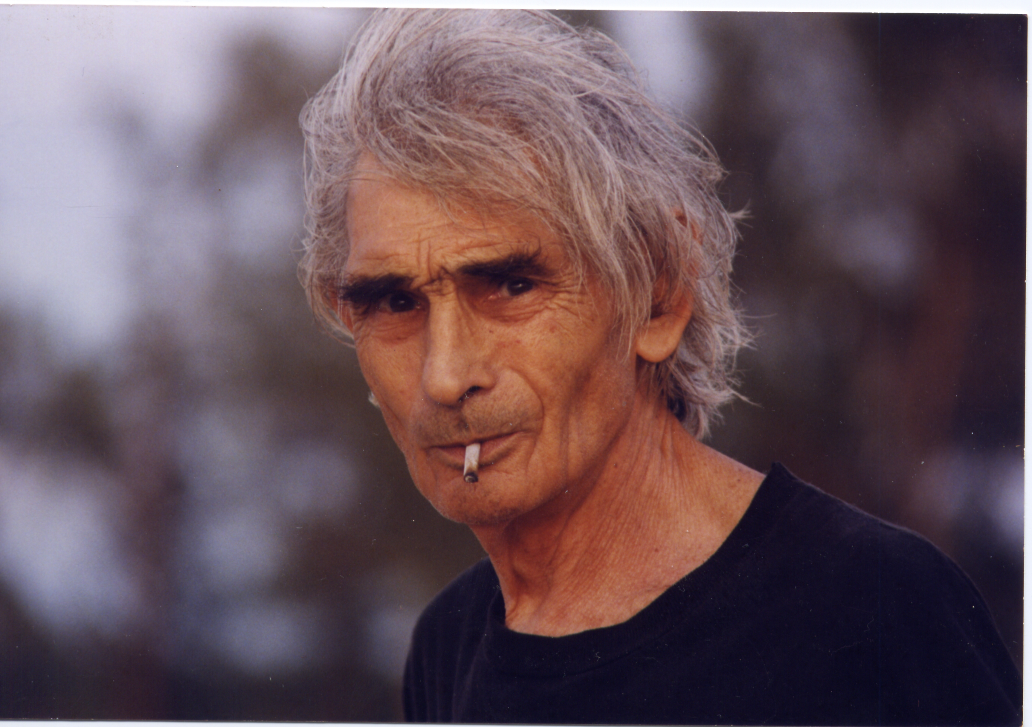 Portrait